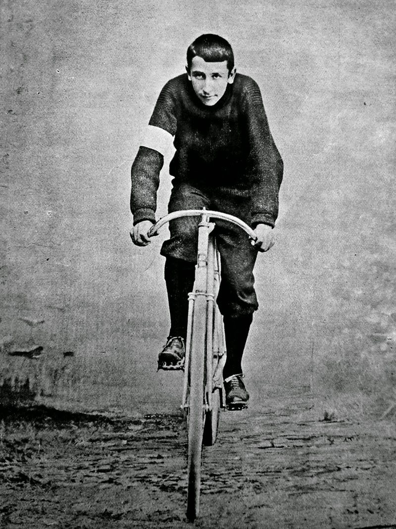 Jorge Ubico, vencedor de carreras de ciclismo en agosto de 1896.